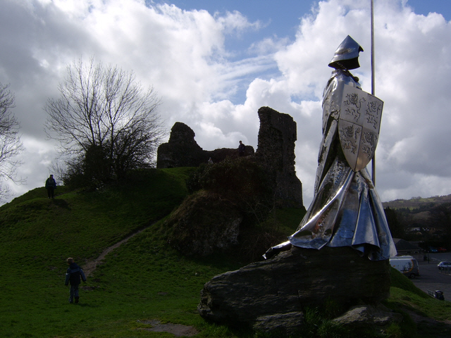 Monument at Llandovery to Welsh hero Llywelyn ap Gruffudd Fychan